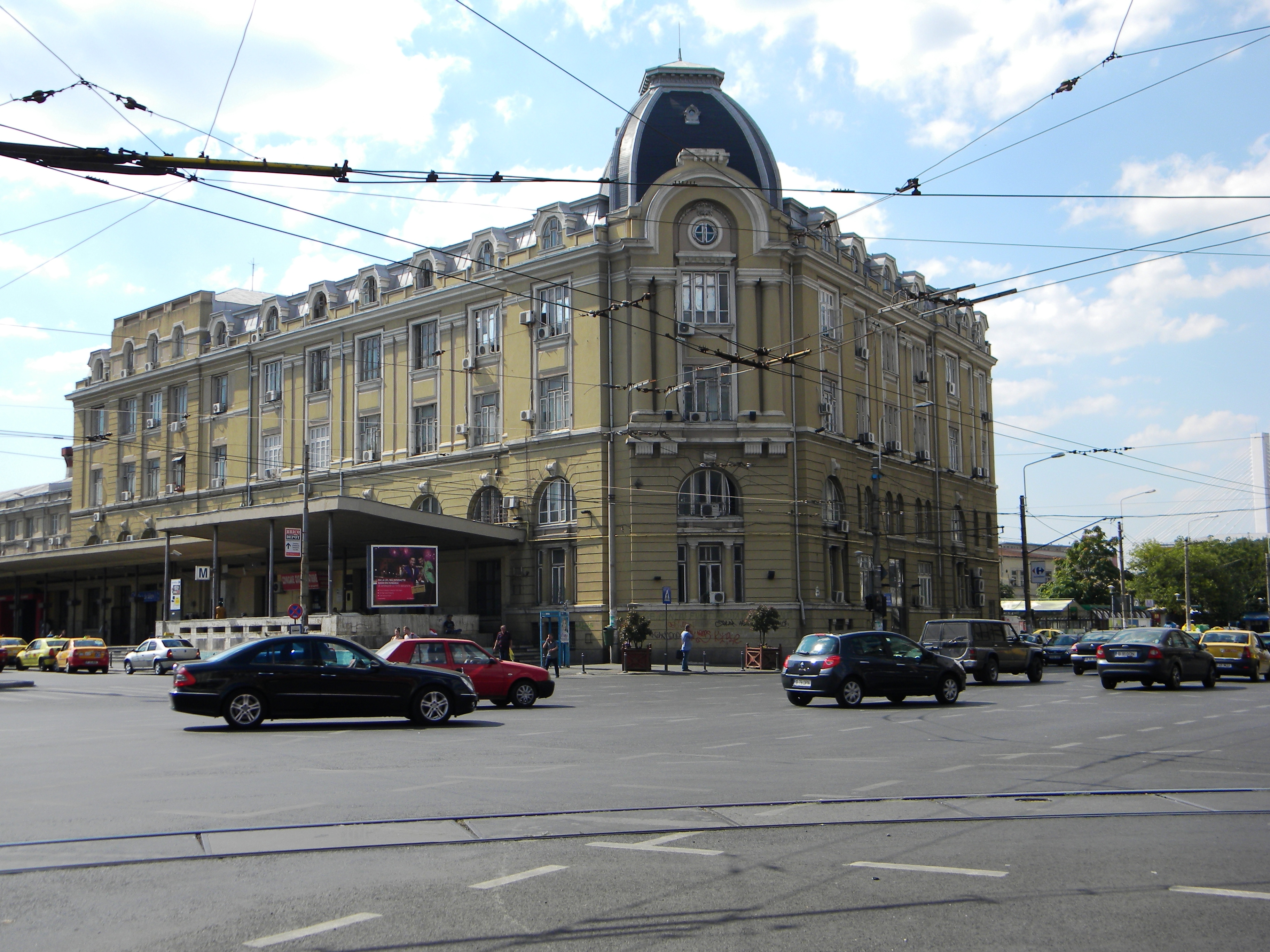 Bucuresti, Romania, Gara de Nord; B-II-m-B-18803 (2)